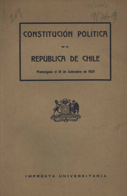 Portada de un ejemplar de la Constitución de la República de Chile de 1925. Santiago: Editorial Universitaria, 1925